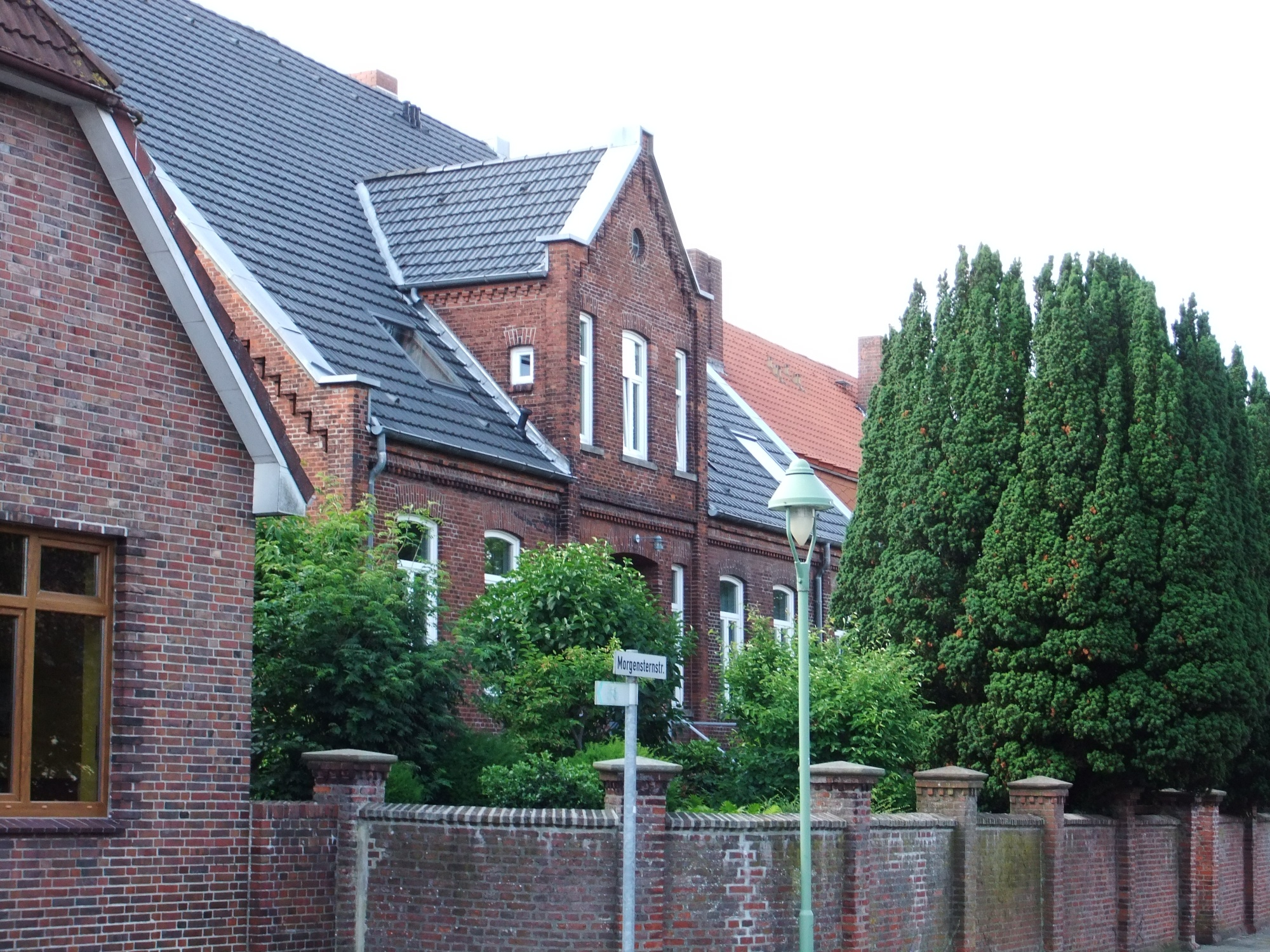 Hof Rall in Bremerhaven, Morgensternstraße 6. Das abgebildete Objekt ist ein geschütztes Kulturdenkmal in der Freien Hansestadt Bremen, mit der Nr. 1650 beim Landesamt für Denkmalpflege registriert.